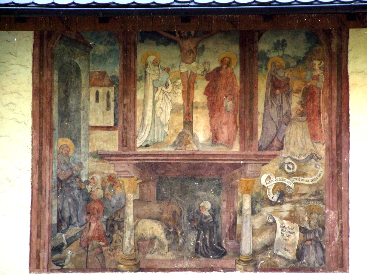 Fresko von Bernhard Strigel an der Kinderlehrkirche zu Memmingen